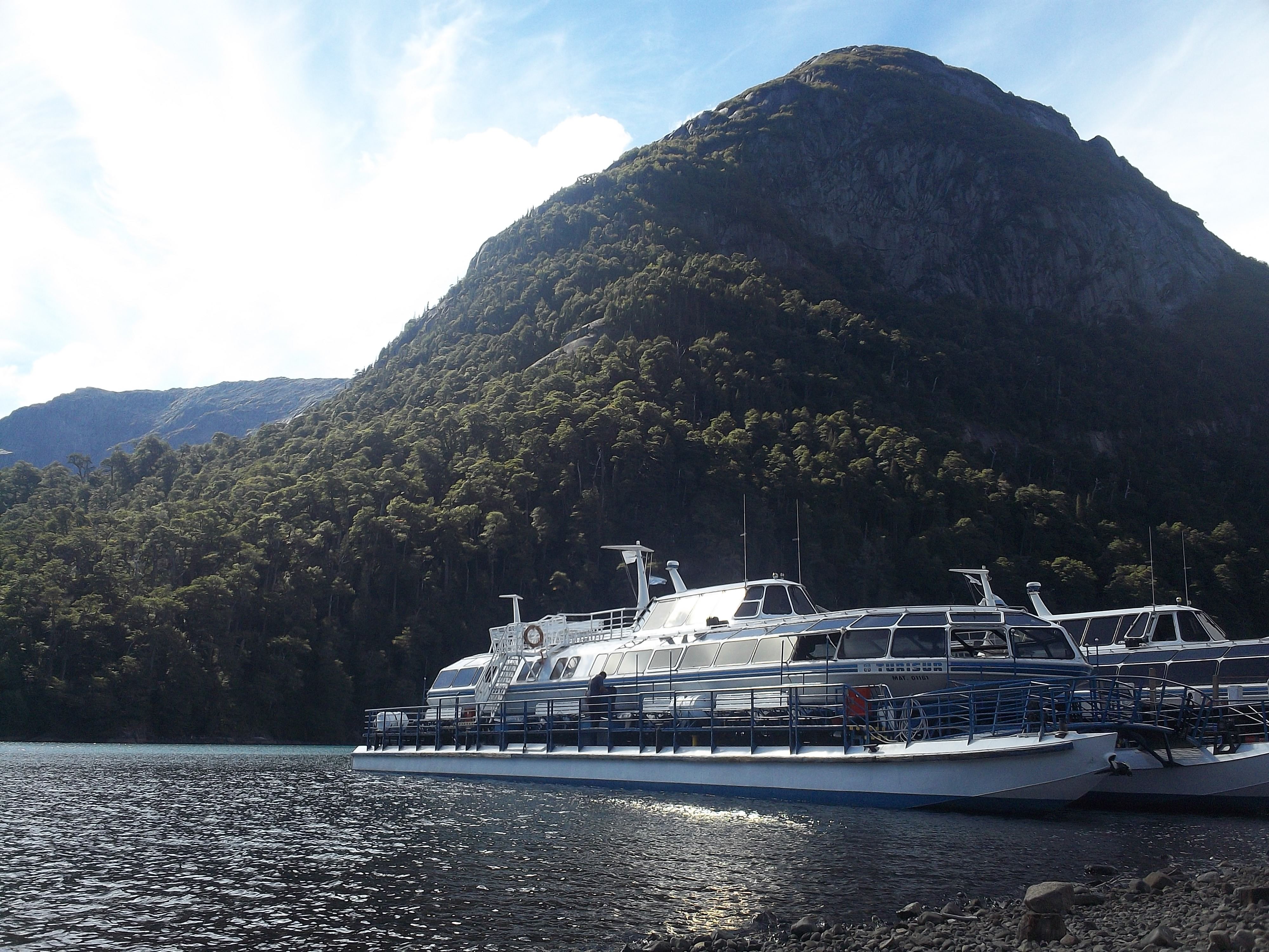 Categoría: imágenes paisajísticas